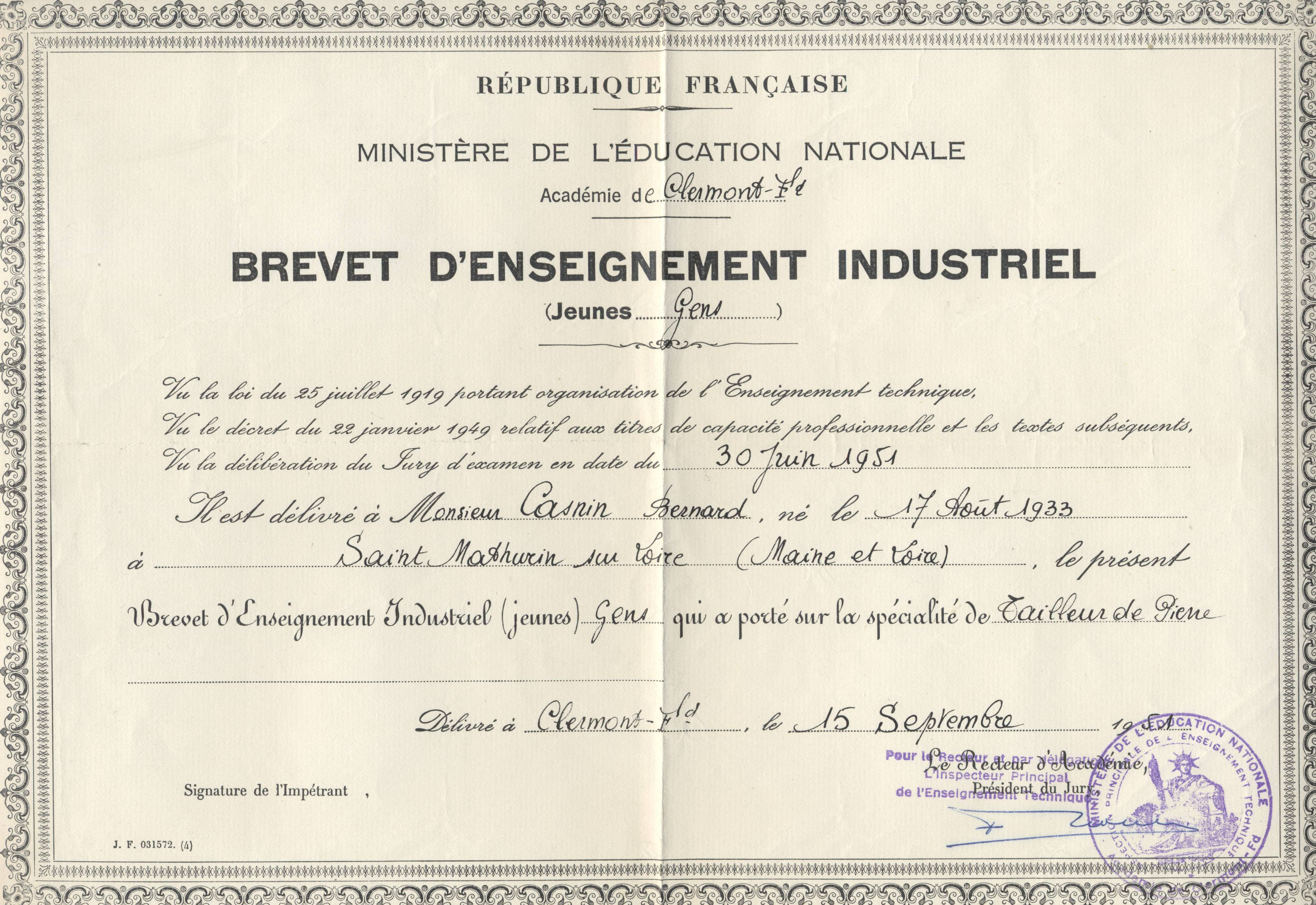 CAP de tailleur de pierre de Bernard Casnin